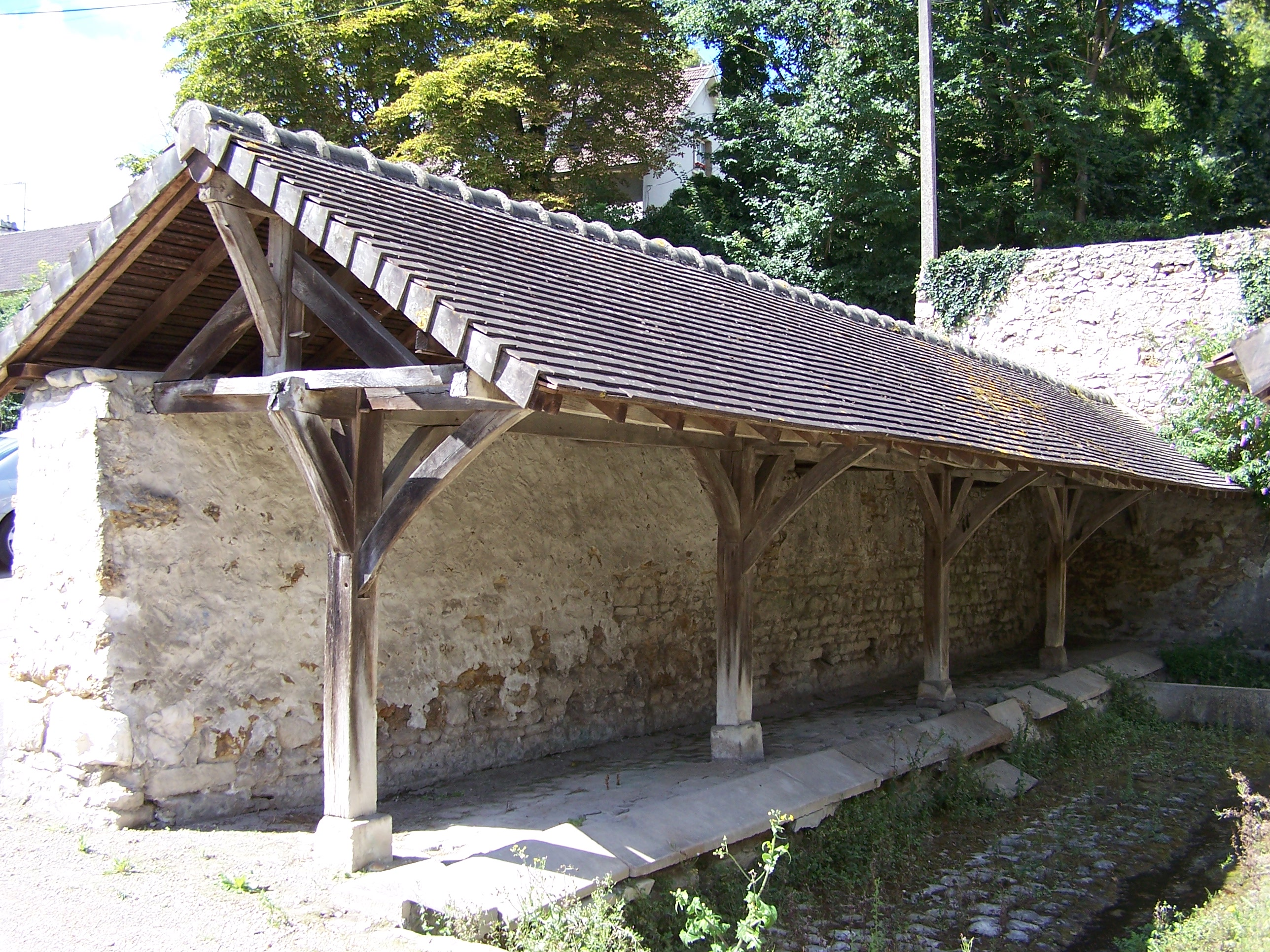 Lavoir de Beulle à Maule (Yvelines, France)